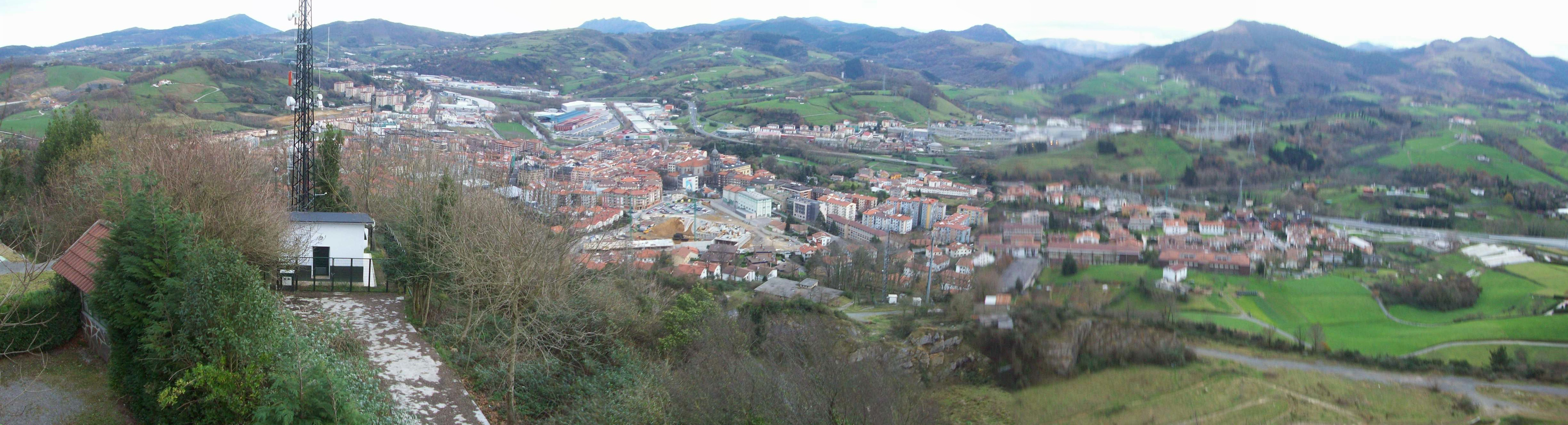 Hernaniko ikuspegi panoramikoa Santa Barbara gotorlekutik ikusia. Gipuzkoa, Euskal Herria.